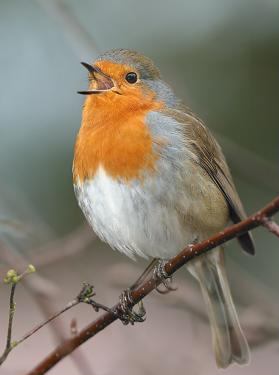 Erithacus rubecula Europees Roodborstje, Monique Bogaerts Categorie:Afbeelding vogel